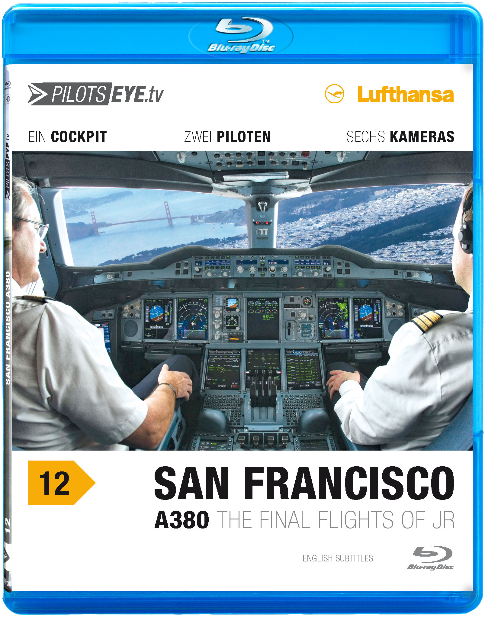 PilotsEYE.tv - the front cover of the Blu-Ray Disc Series SAN FRANCISCO